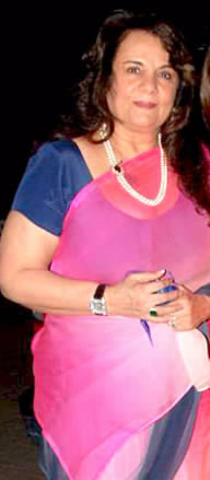 Mumtaz at Laila Khan's engagement